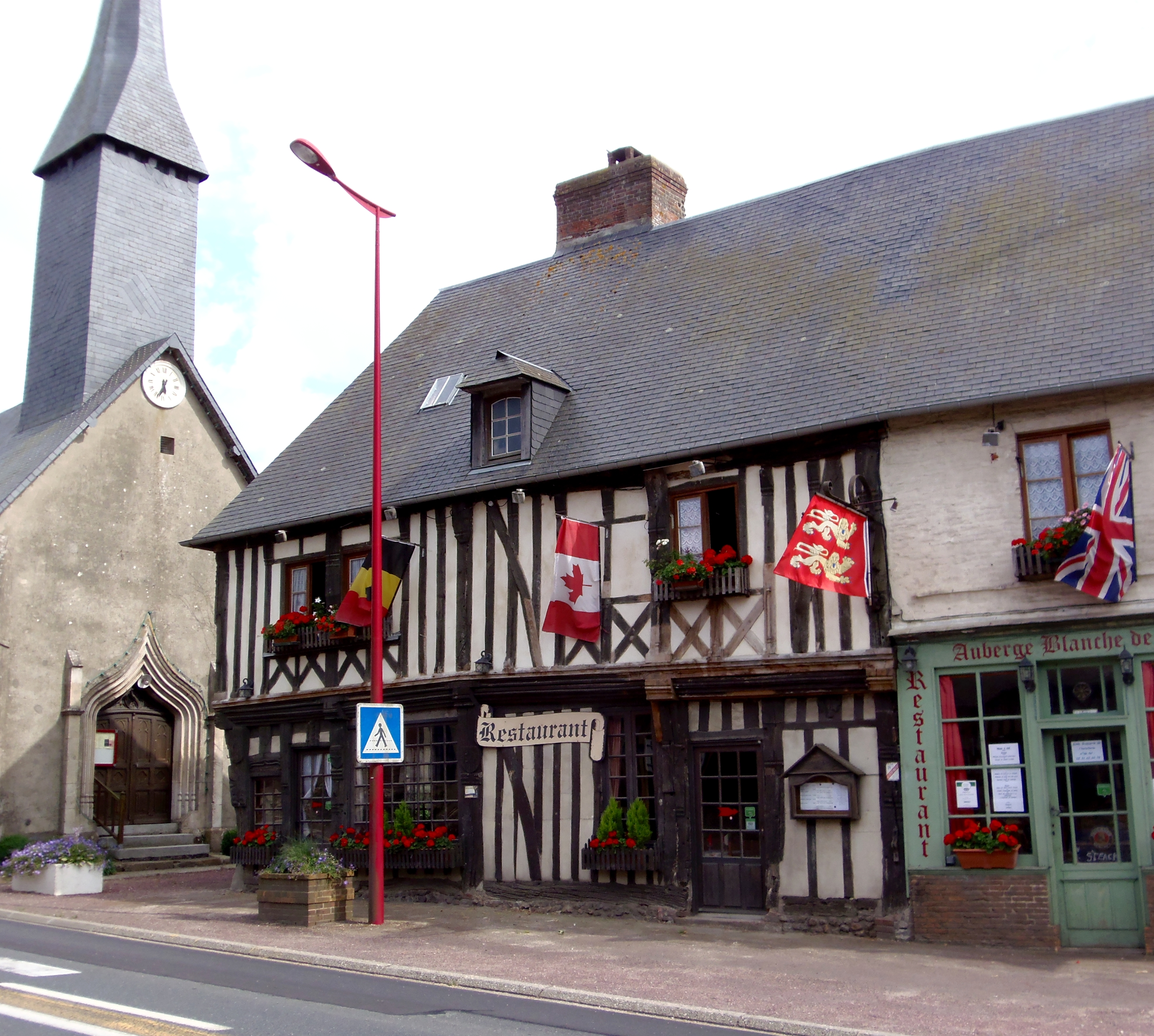 L'Hôtellerie (Normandie, France). Le manoir de Blanche de Castille.